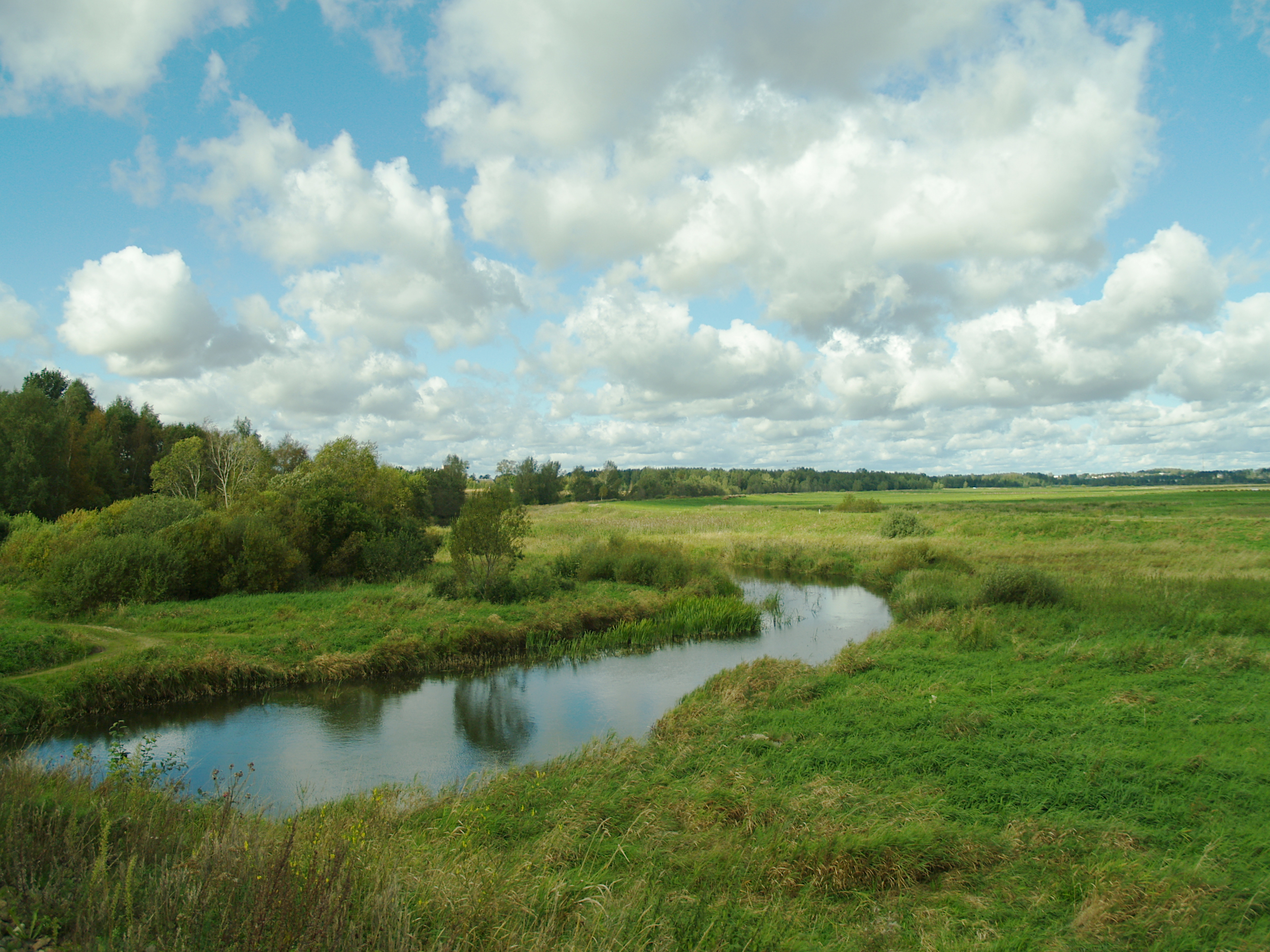 Porijõgi Uhti raudteesilla juures.